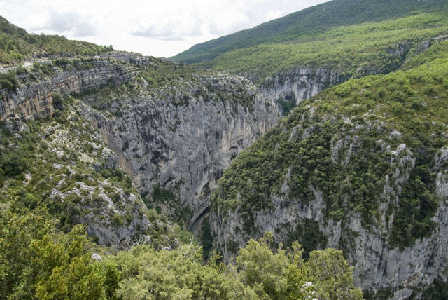 La vallée de la Rivière Verdon